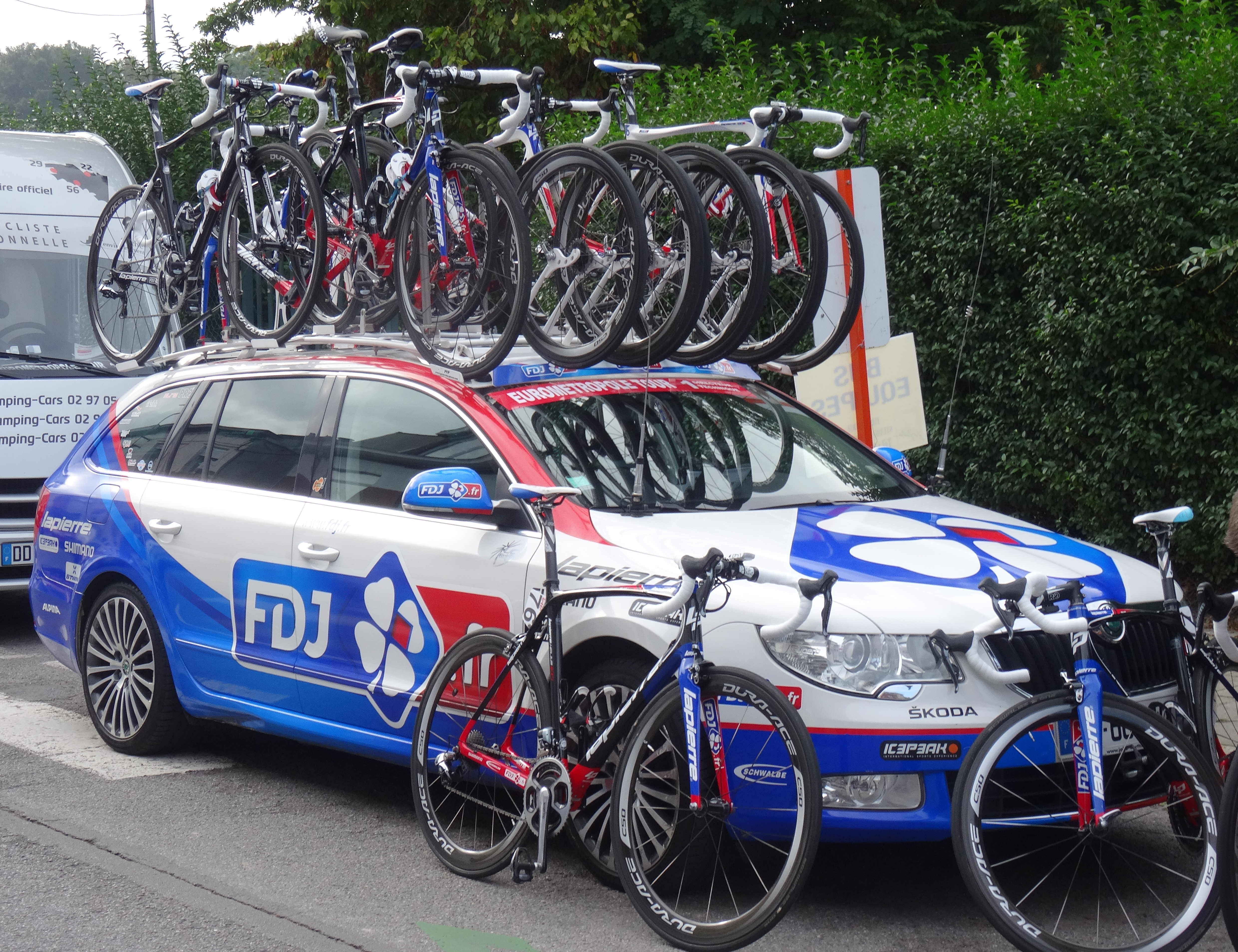 Reportage photographique réalisé le jeudi 2 octobre à l'occasion du départ de la première étape de l'Eurométropole Tour 2014 à La Louvière, Belgique.